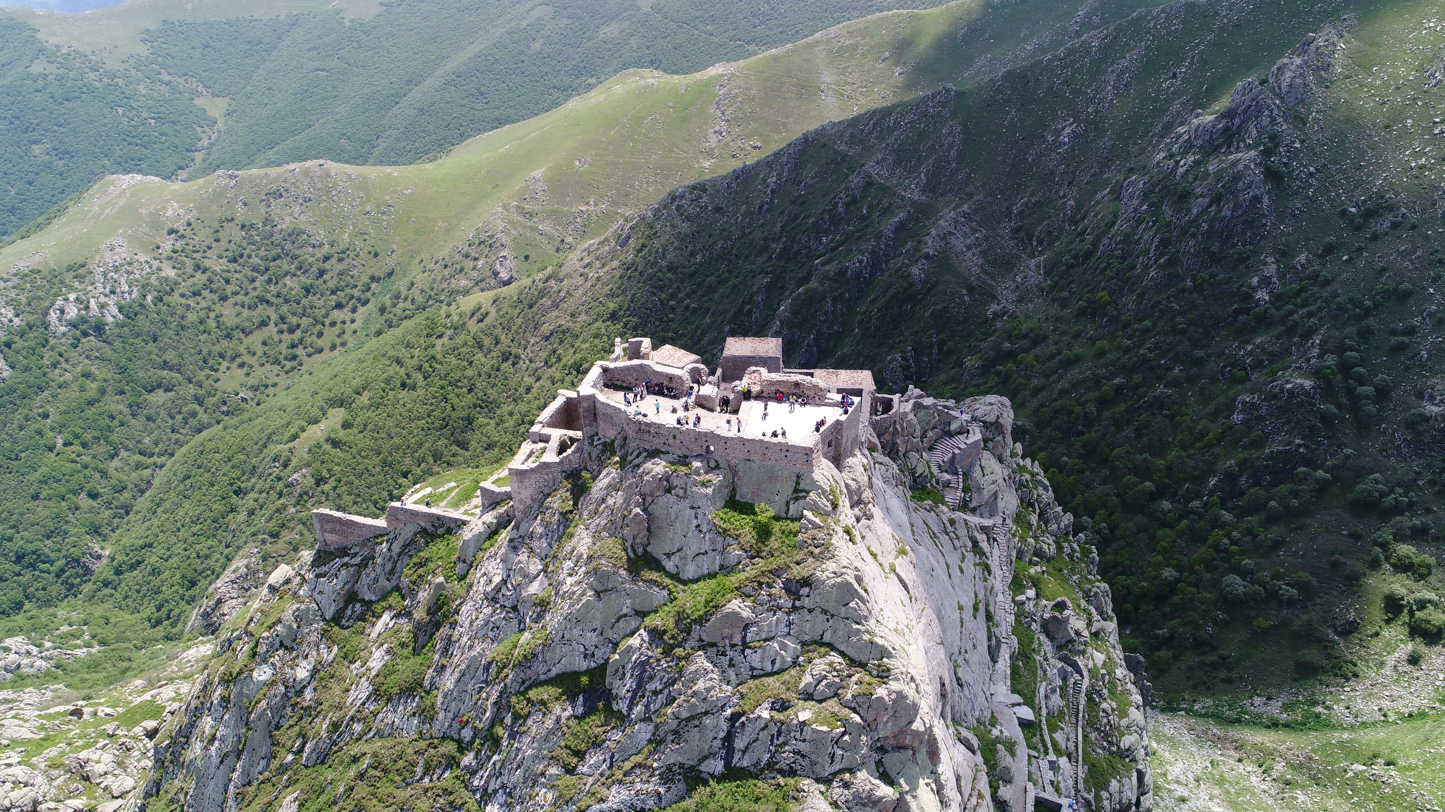 قلعه و قصر جمهور (بز قلعه سی یا قلعهٔ بابک)